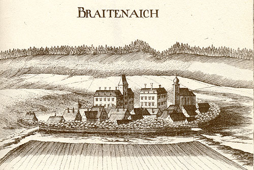 Vischer-Stich von Schloss Breiteneich, Kupferstich, um 1672